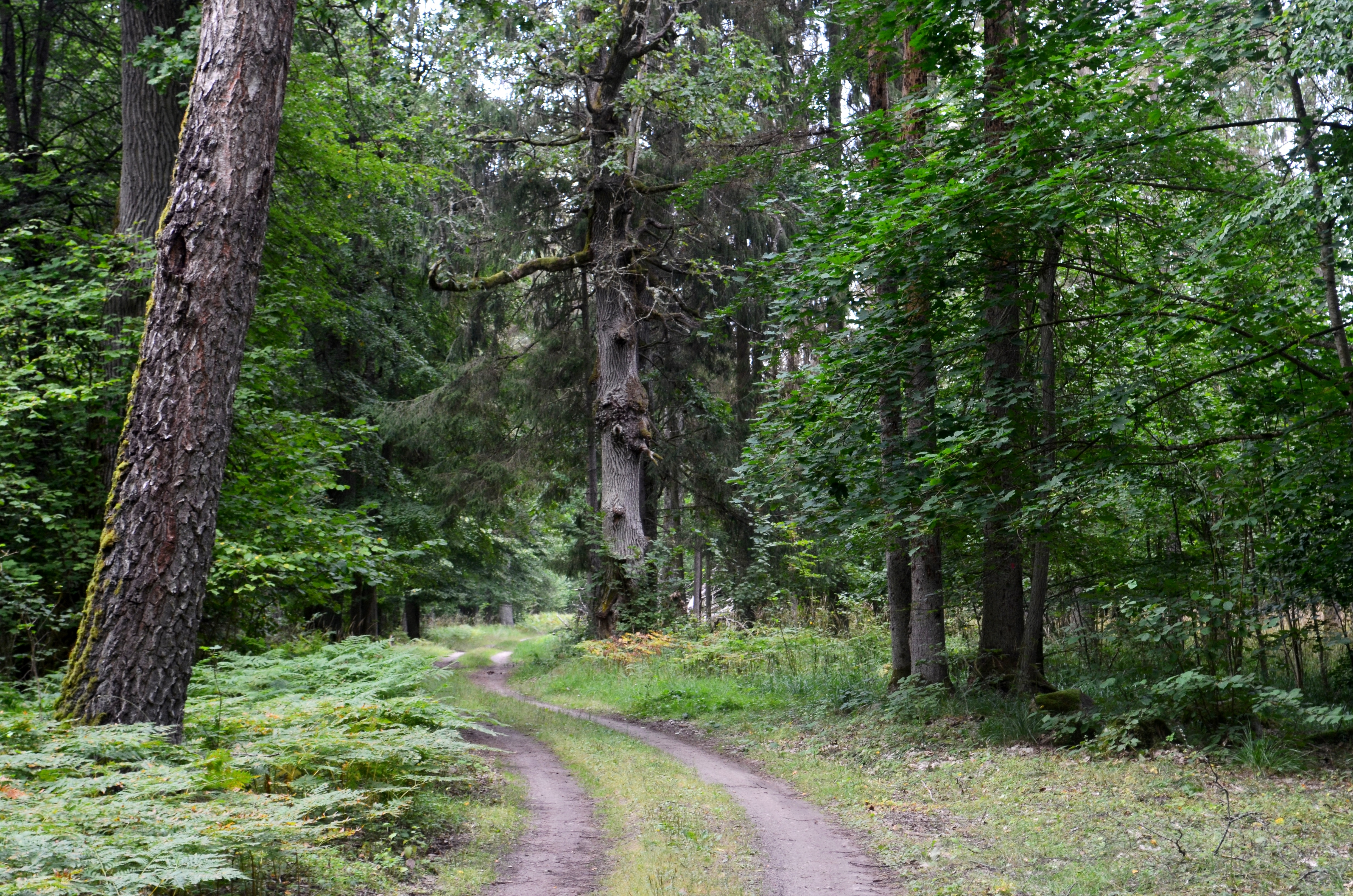 Punios šilas, Alytaus raj.